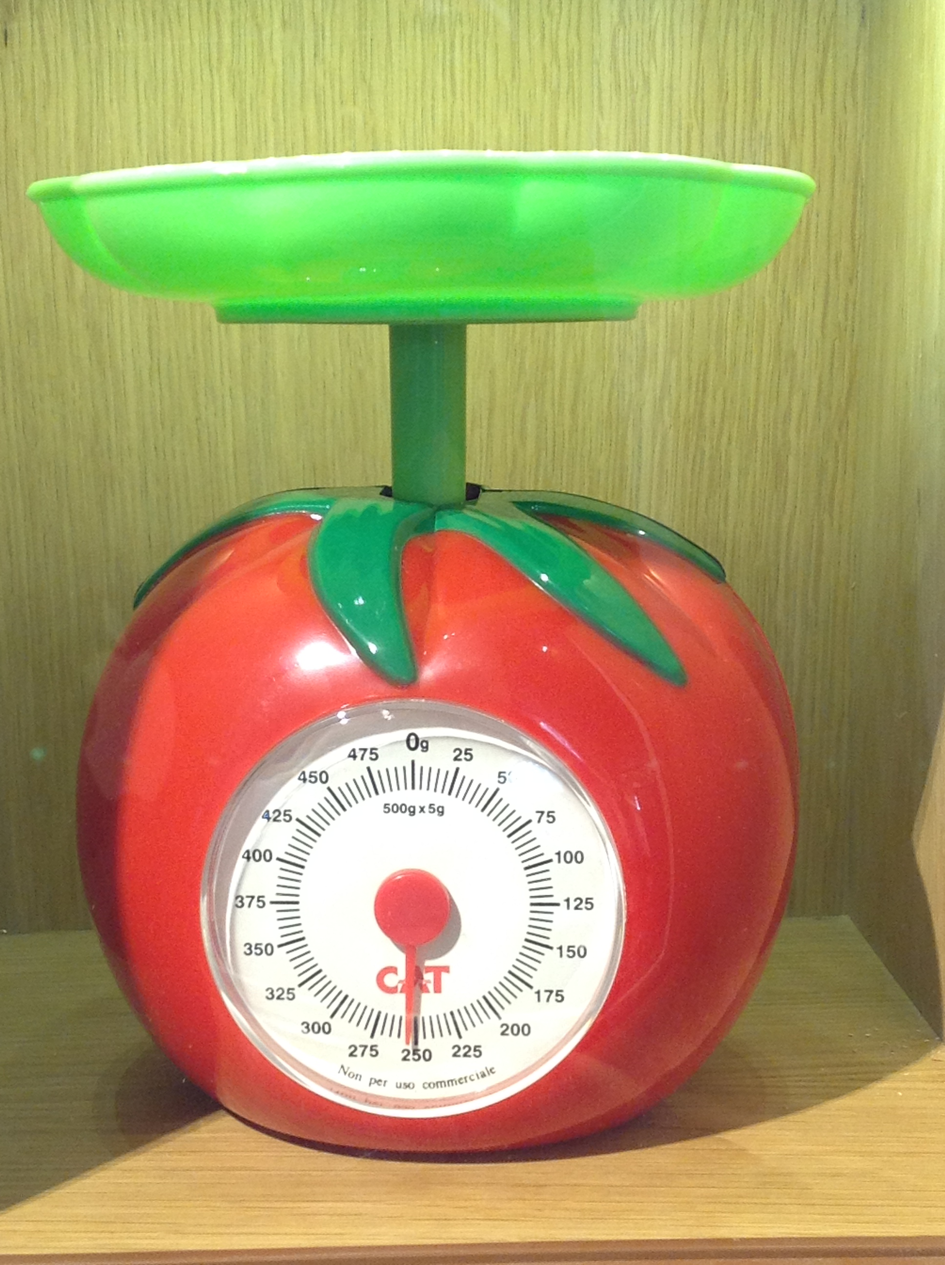 Bilancia da cucina a forma di pomodoro rosso, con recipiente di pesatura di colore verde. Pesata massima 500 grammi. " Recipiente di pesatura incluso " Ingombro: (Ø x H) mm " Colore: rosso " Confezione: scatola